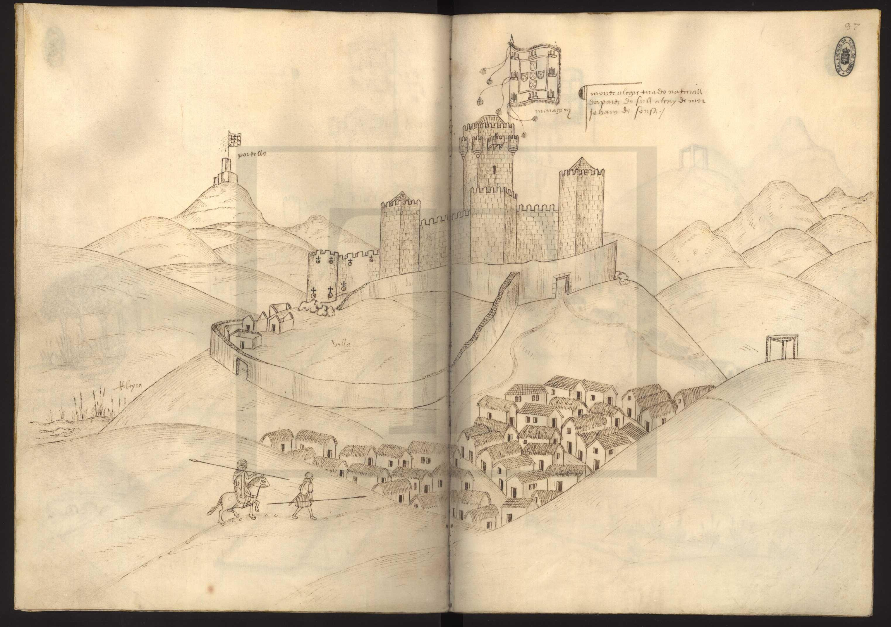 Livro das Fortalezas 97 - Montalegre